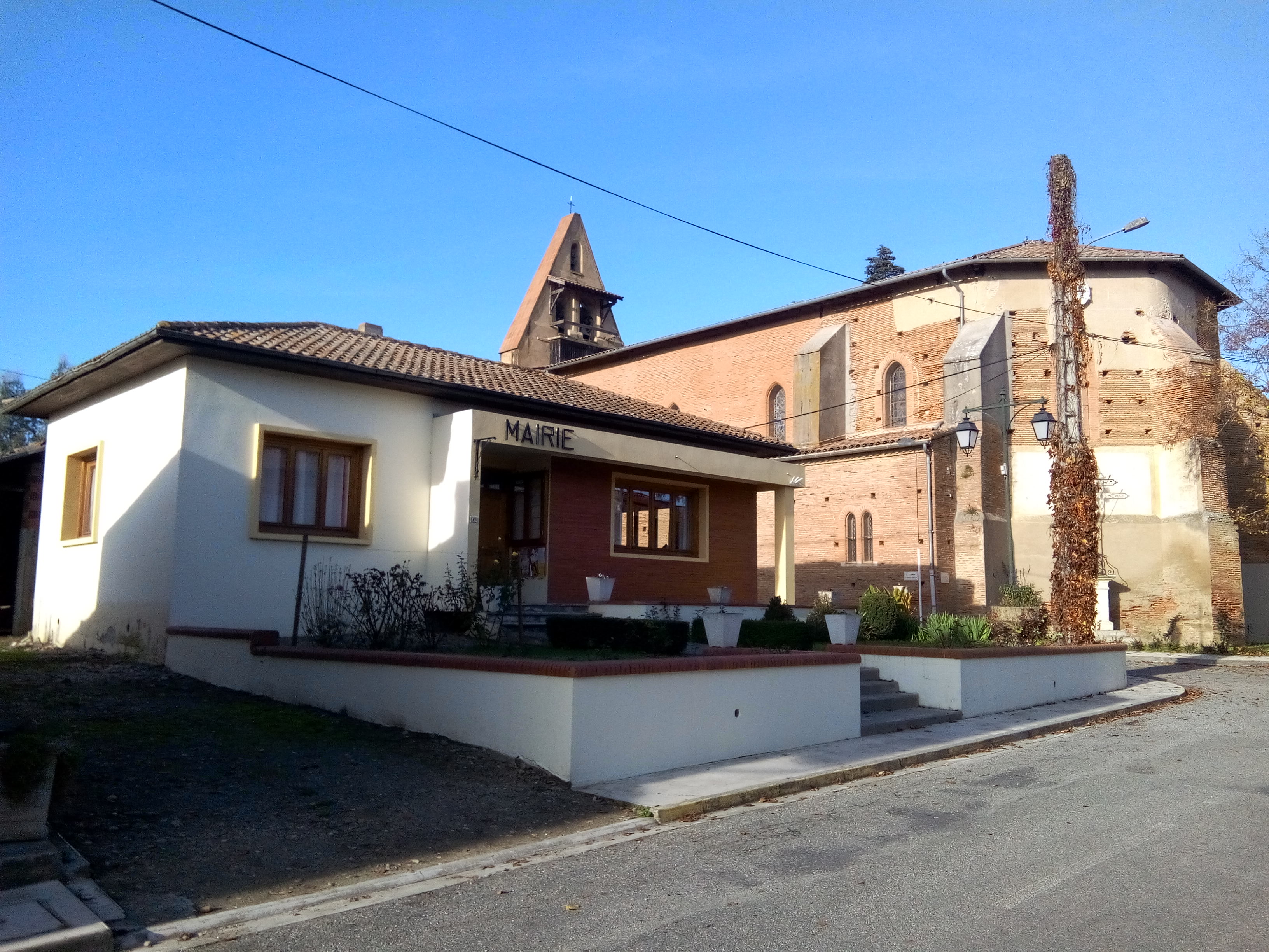 Marignac-Lasclares mairie et église